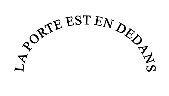 Inscription gravée sur la porte de l'église Sainte-Onenne (Tréhorenteuc) à la demande de l'abbé Gillard